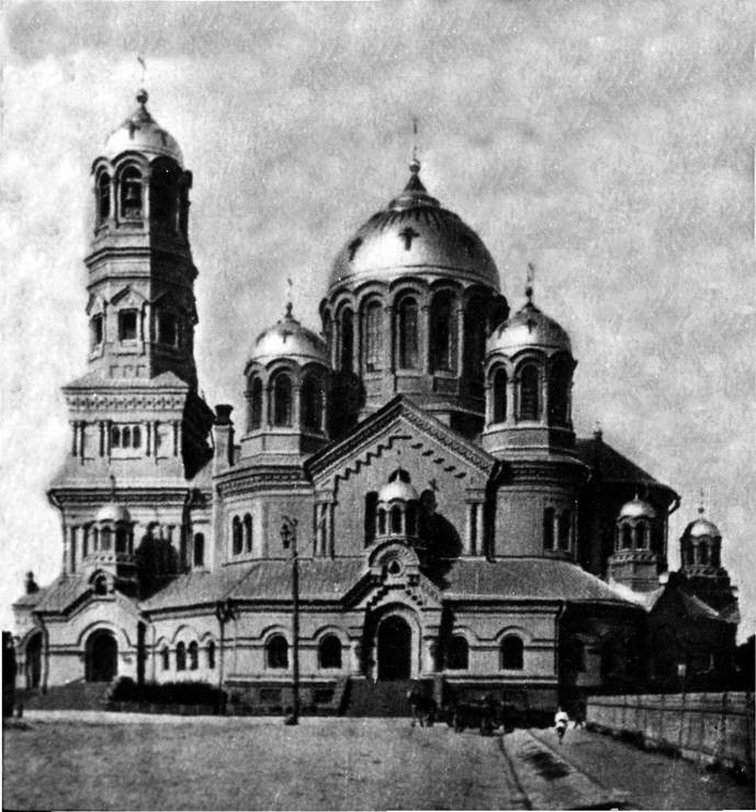 Самара. Кафедральный собор. Фотография. ~1900-е годы.